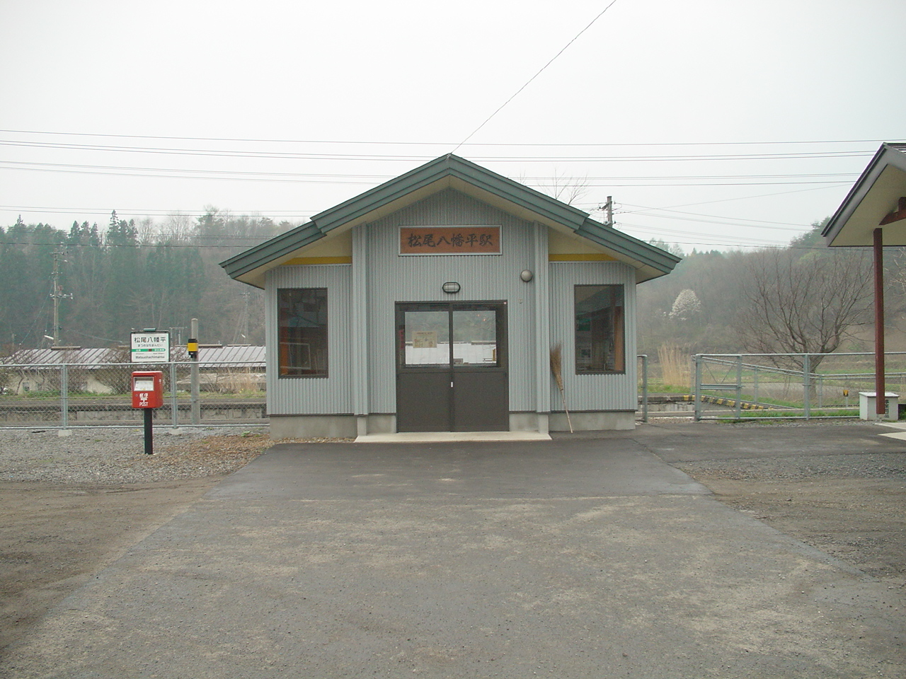 （松尾八幡平駅）